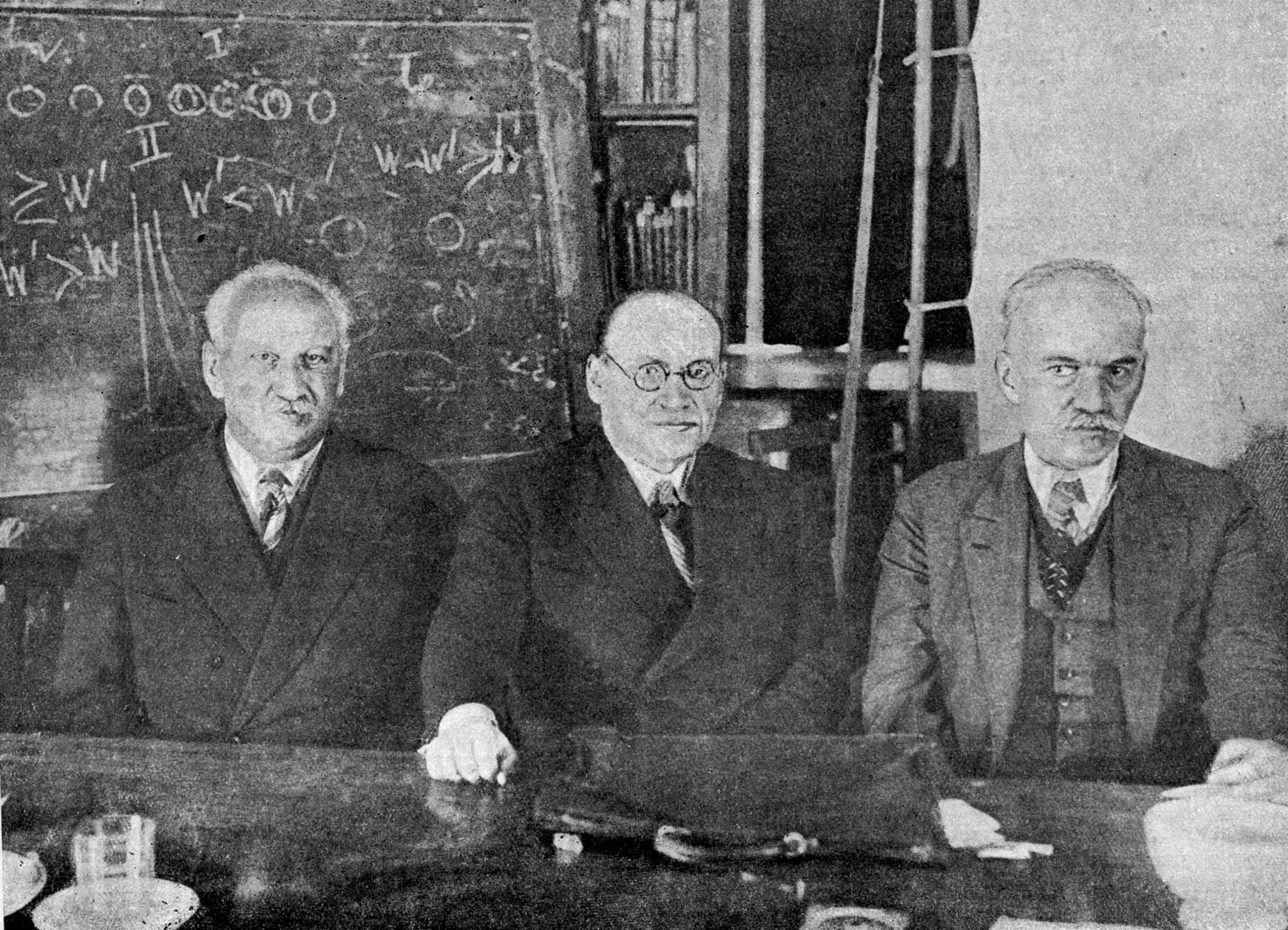 Академики А. Ф. Иоффе, Я. И. Френкель и А. Г. Гольдман, Киев, май 1935 г.